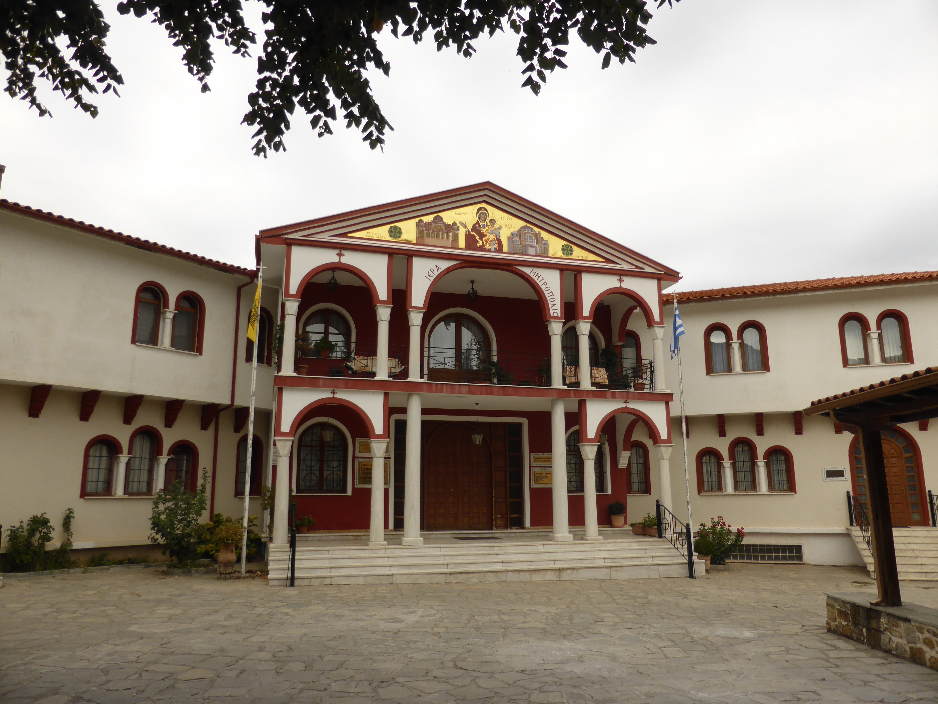 Gebäude neben der Kirche in Arnea, Chalkidiki, Griechenland.